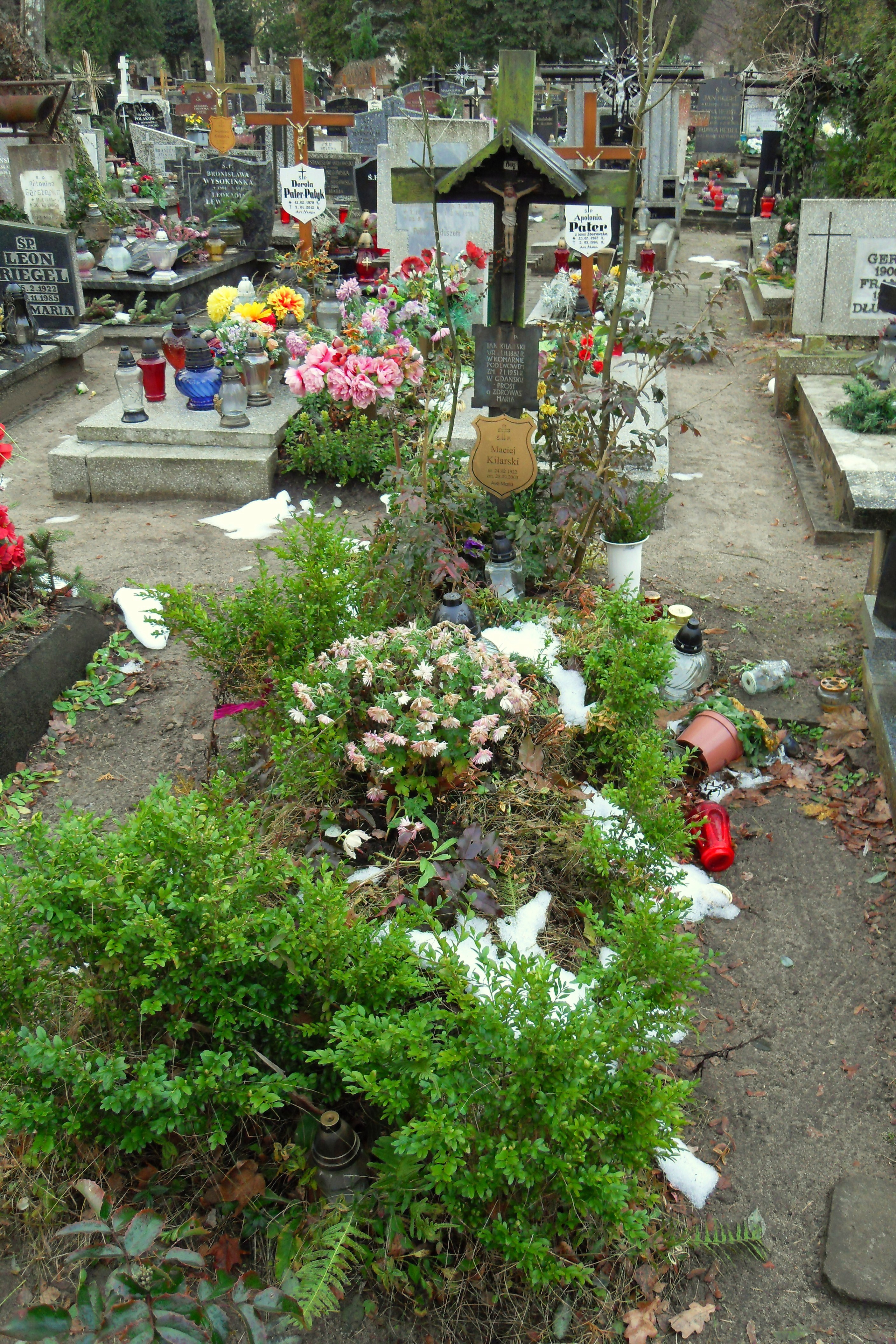 Gdańsk Oliwa. Cmentarz Oliwski, grób Jana Kilarskiego i Macieja Kilarskiego.